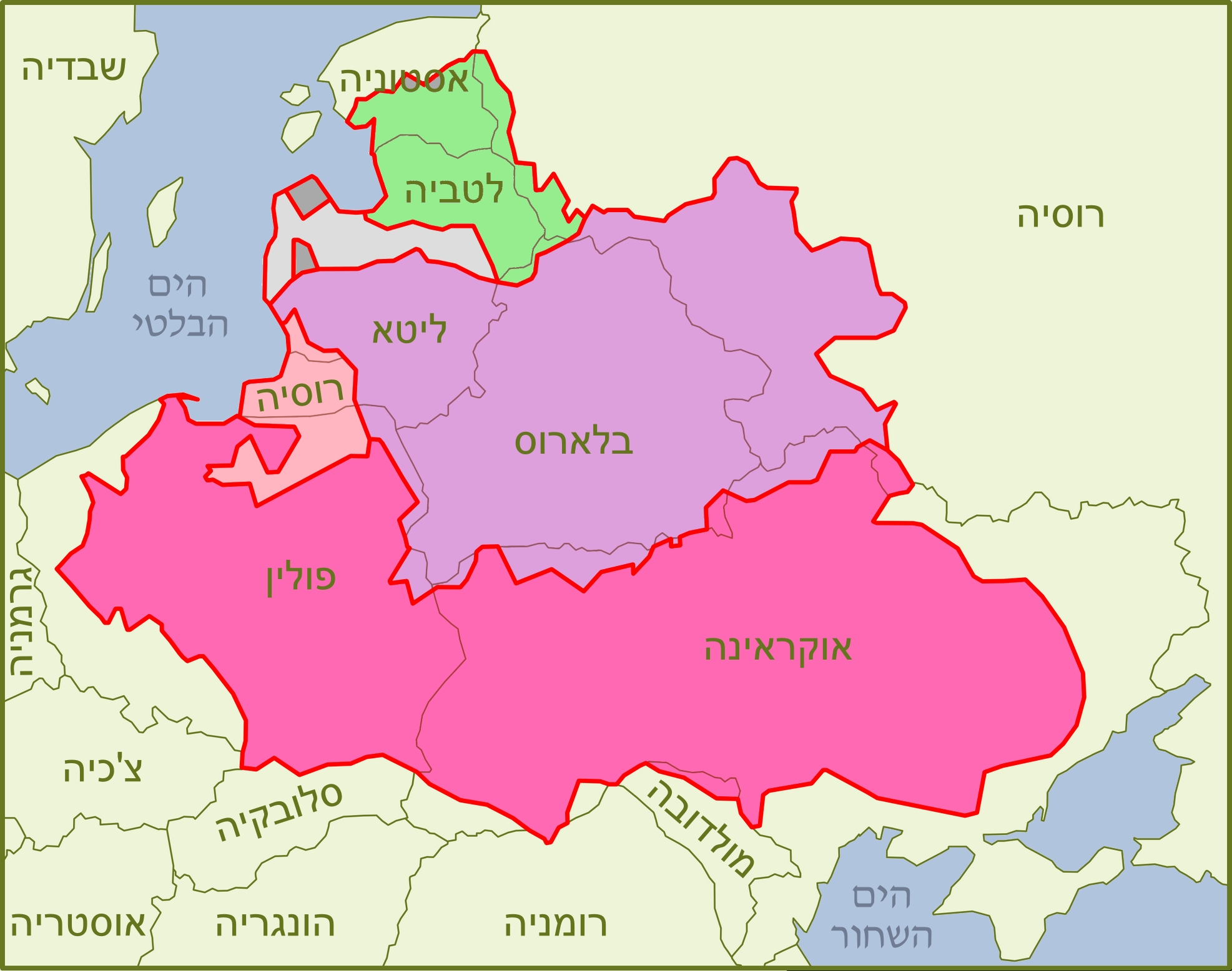 האיחוד הפולני-ליטאי